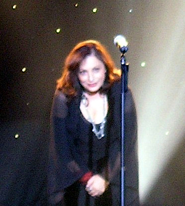 Xaris Alexiou, Konzert im Konzertsaal der Universität der Künste in Berlin am 21. Oktober 2006